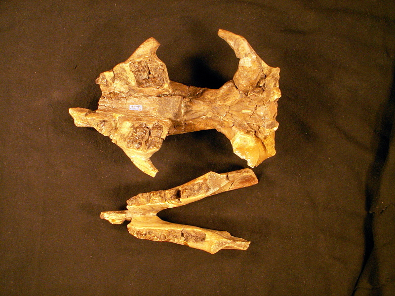 Trogosus hillsi Gazin, 1953